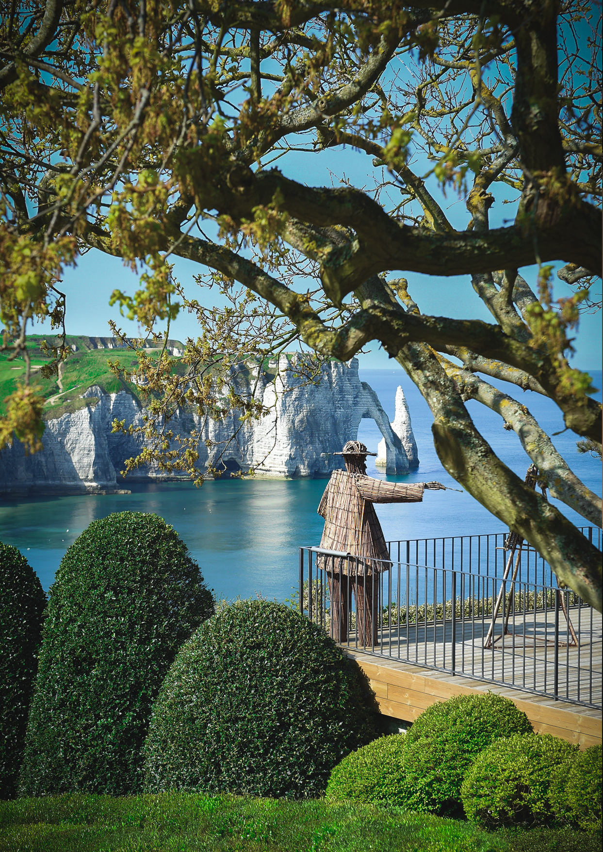 клод моне